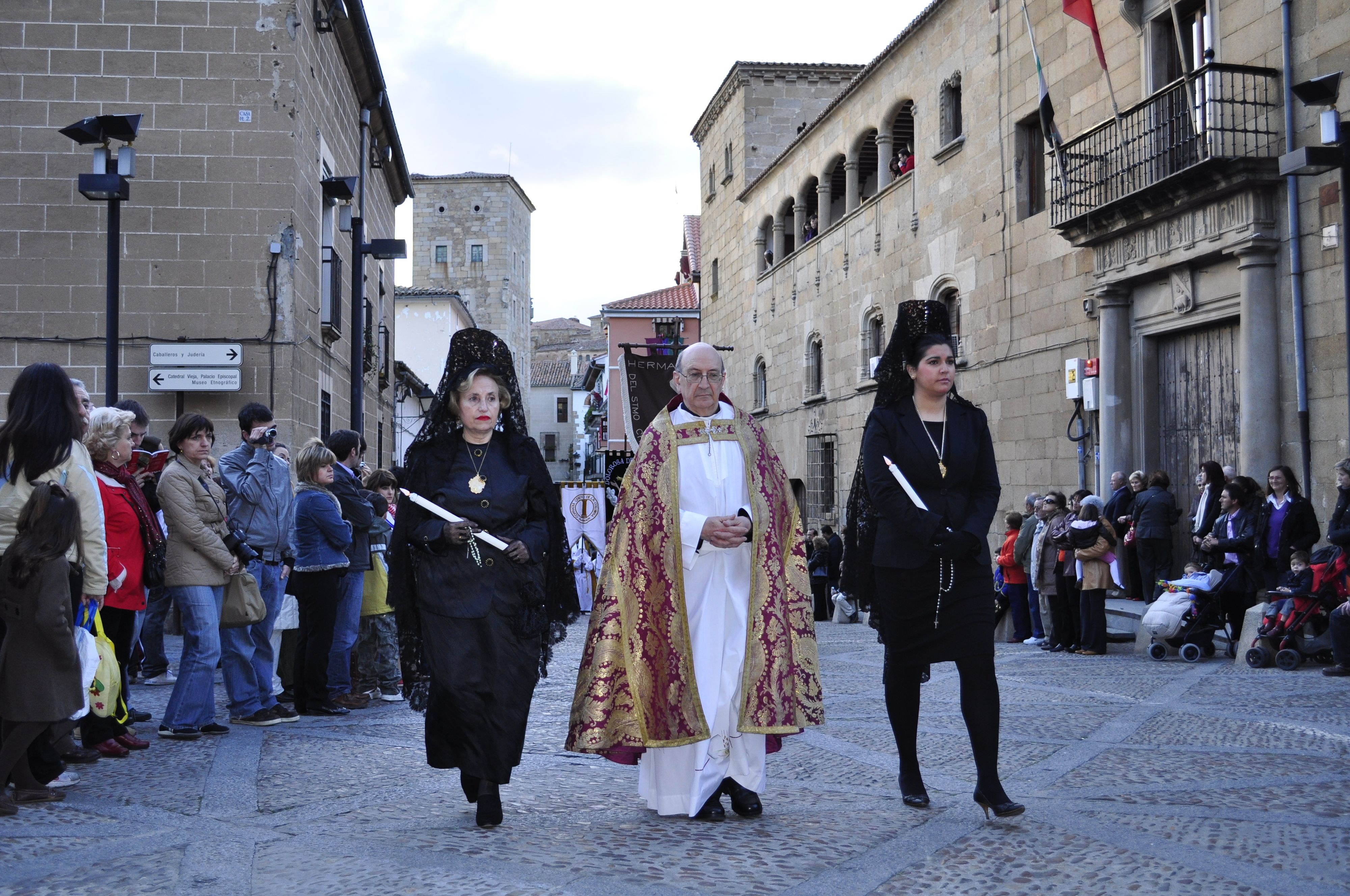 Cofradia de la Soledad y Santo Sepulcro. Hermano Mayor: Narciso Juanals Parroquia: Santo Domingo Año de Fundación: Comienzos del Siglo XV Hermano Mayor: Narciso Juanals Hora de salida: 19,30 horas Pasos:Nuestra Señora de la Soledad, Santo Sepulcro, San Juan María Magdalena y San Pedro Acompañamiento musical: La banda de música de la OJE de Plasencia Número de hermanos de la cofradía: 700 (